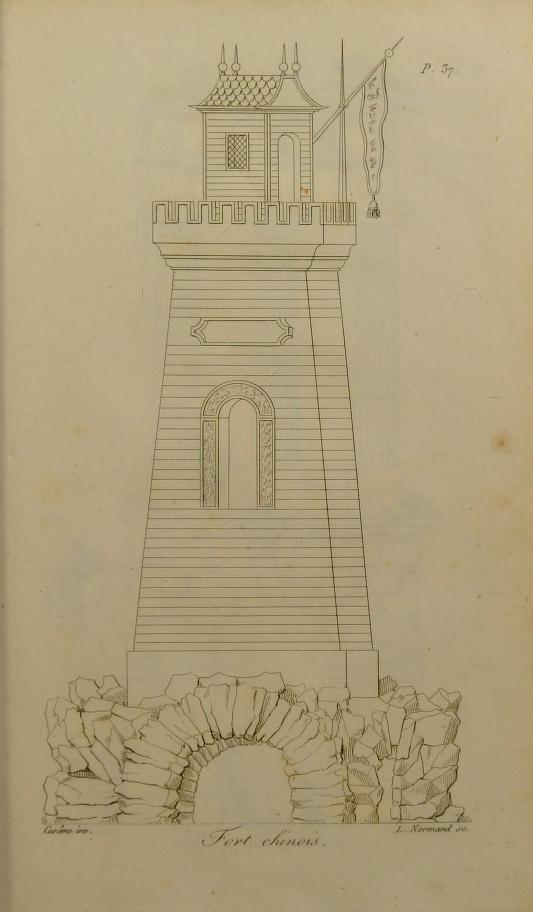 安東南‧卡漢姆的「裝置」蛋糕設計圖樣